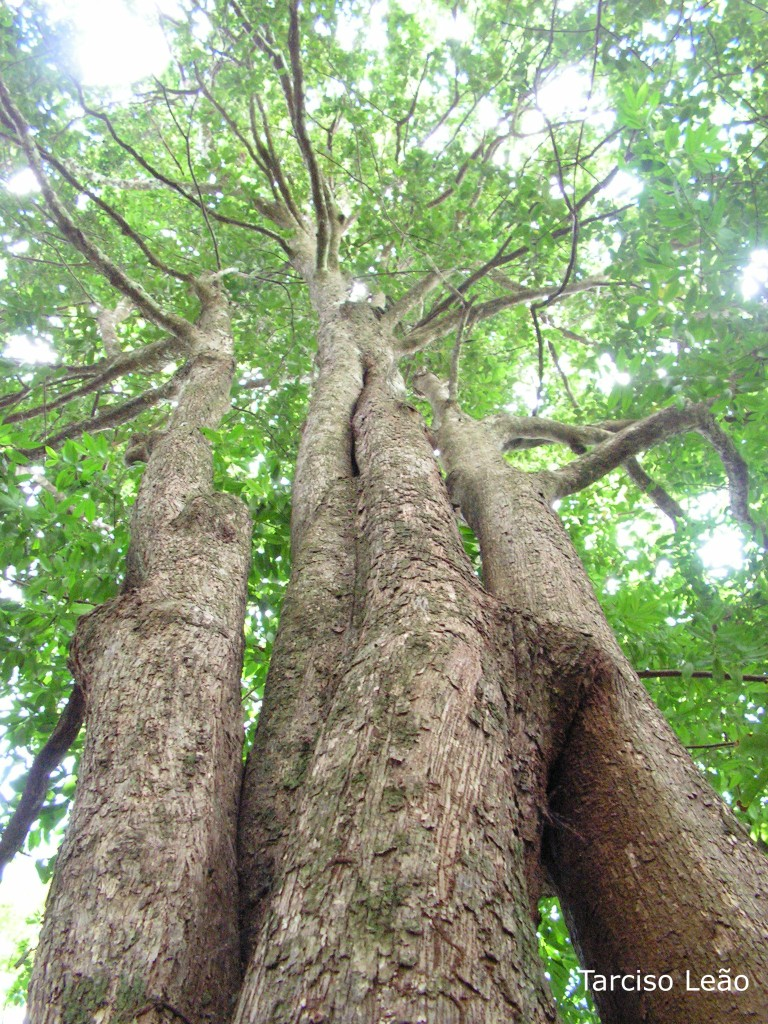 Local: Mata do Sabiá, Cabo de Santo Agostinho, Pernambuco, Brasil.